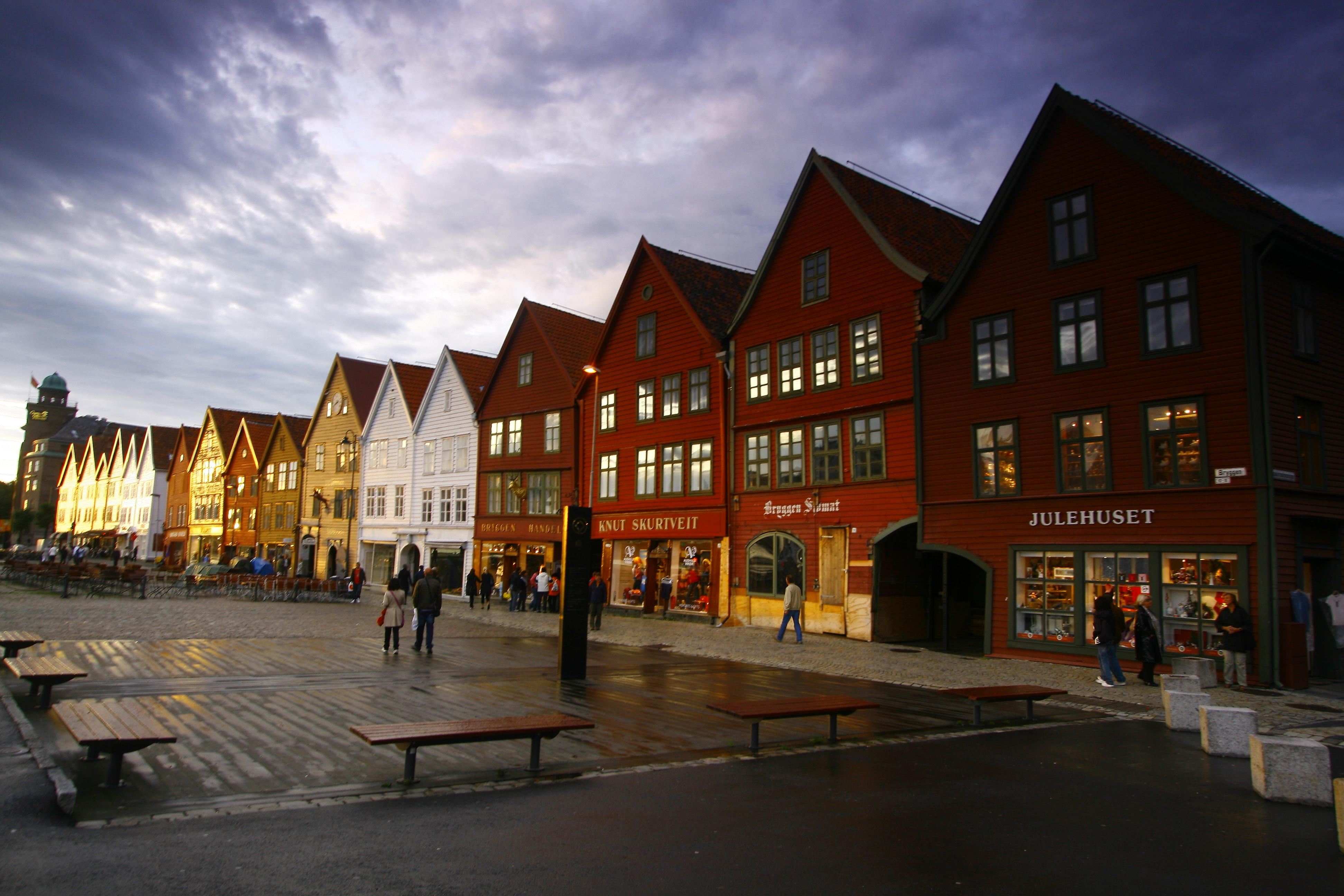 Bryggen, Bergen, Norway